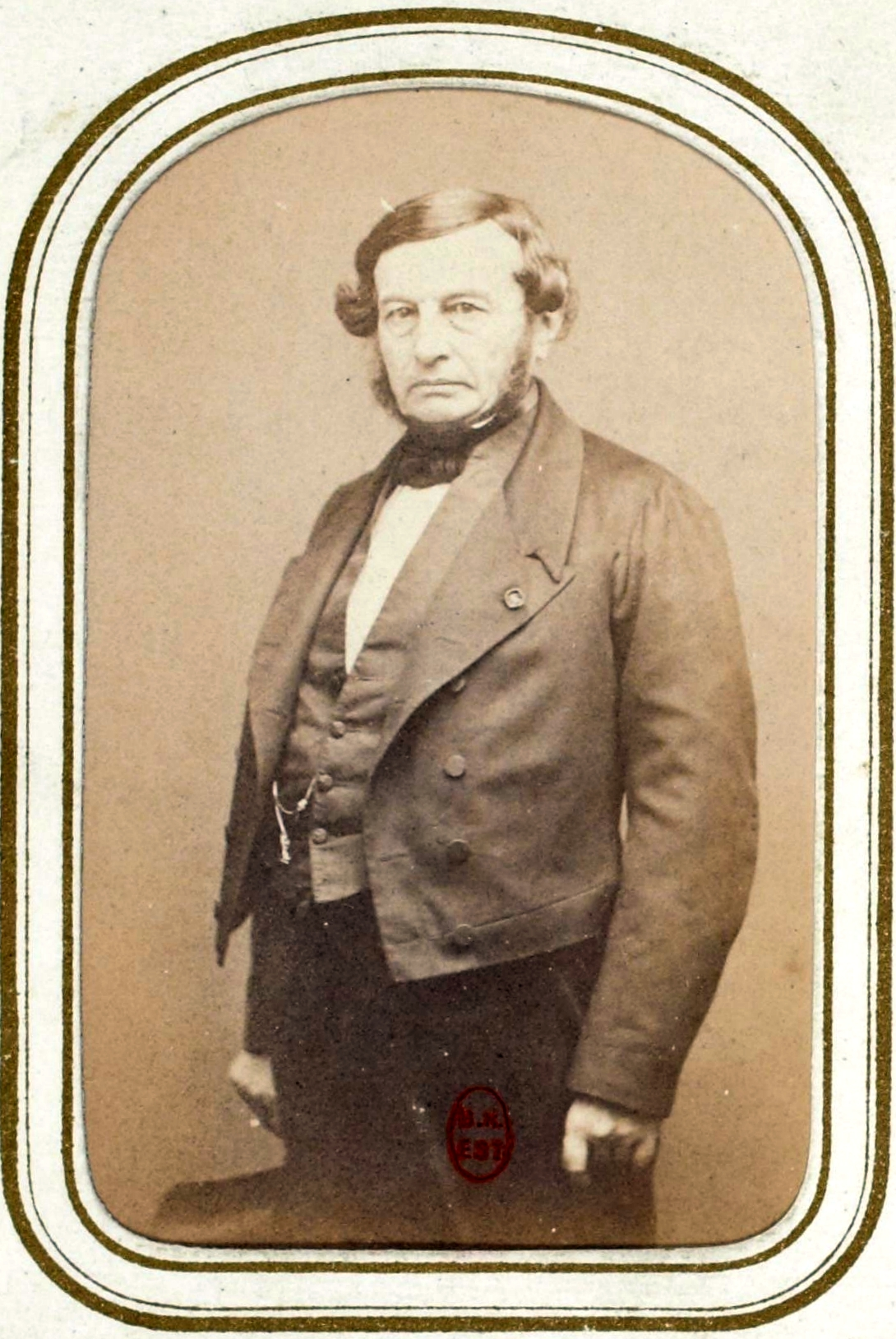 [Recueil. Personnalités des arts et des lettres] : vue 31 - F. 13. Joseph-François Malgaigne (Carjat phot.)